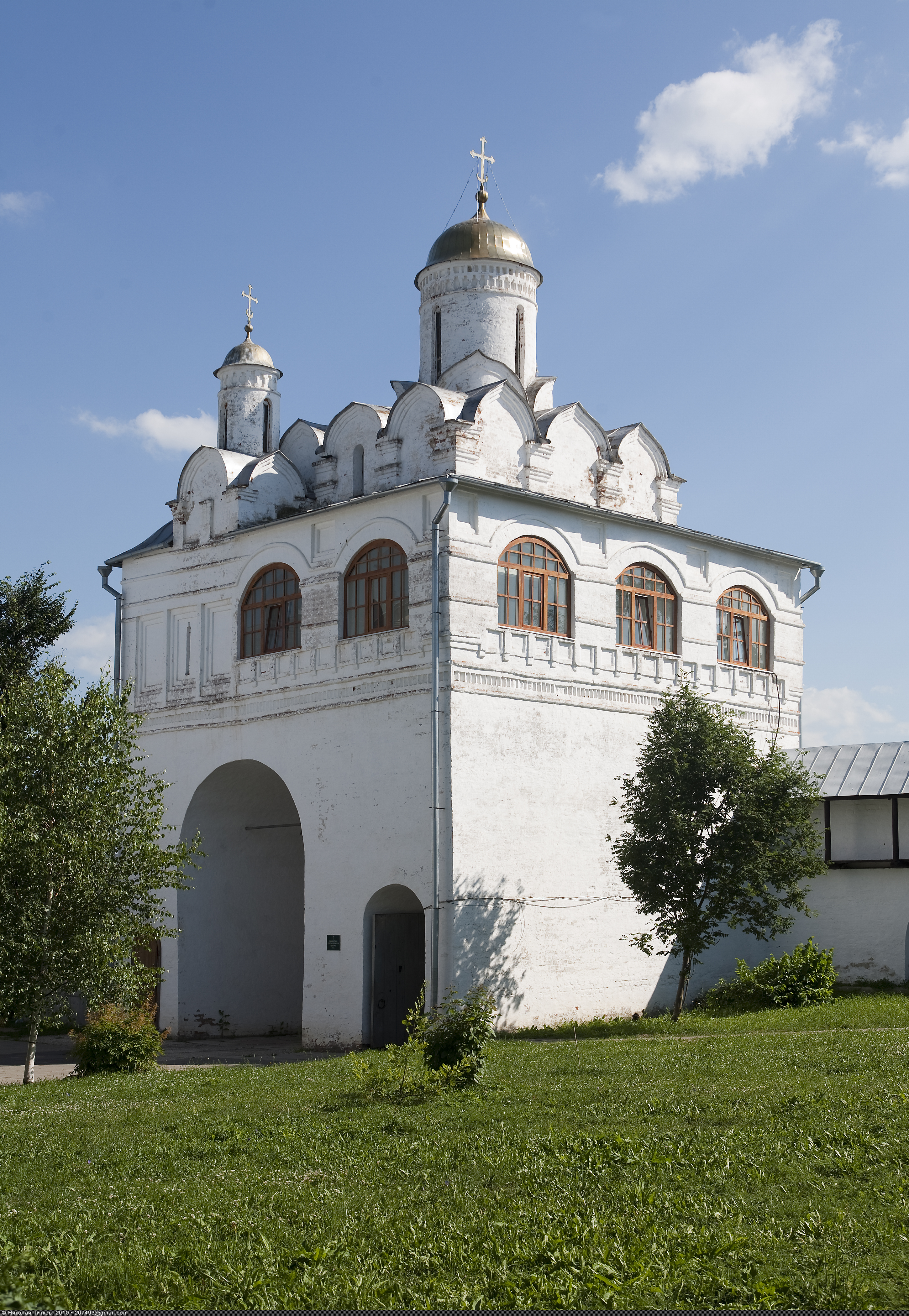 Покровский женский монастырь, Святые ворота и надвратная Благовещенская церковь. (Суздаль)